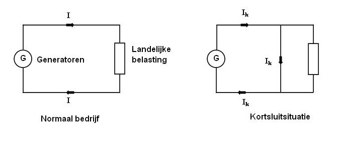 Kortsluiting